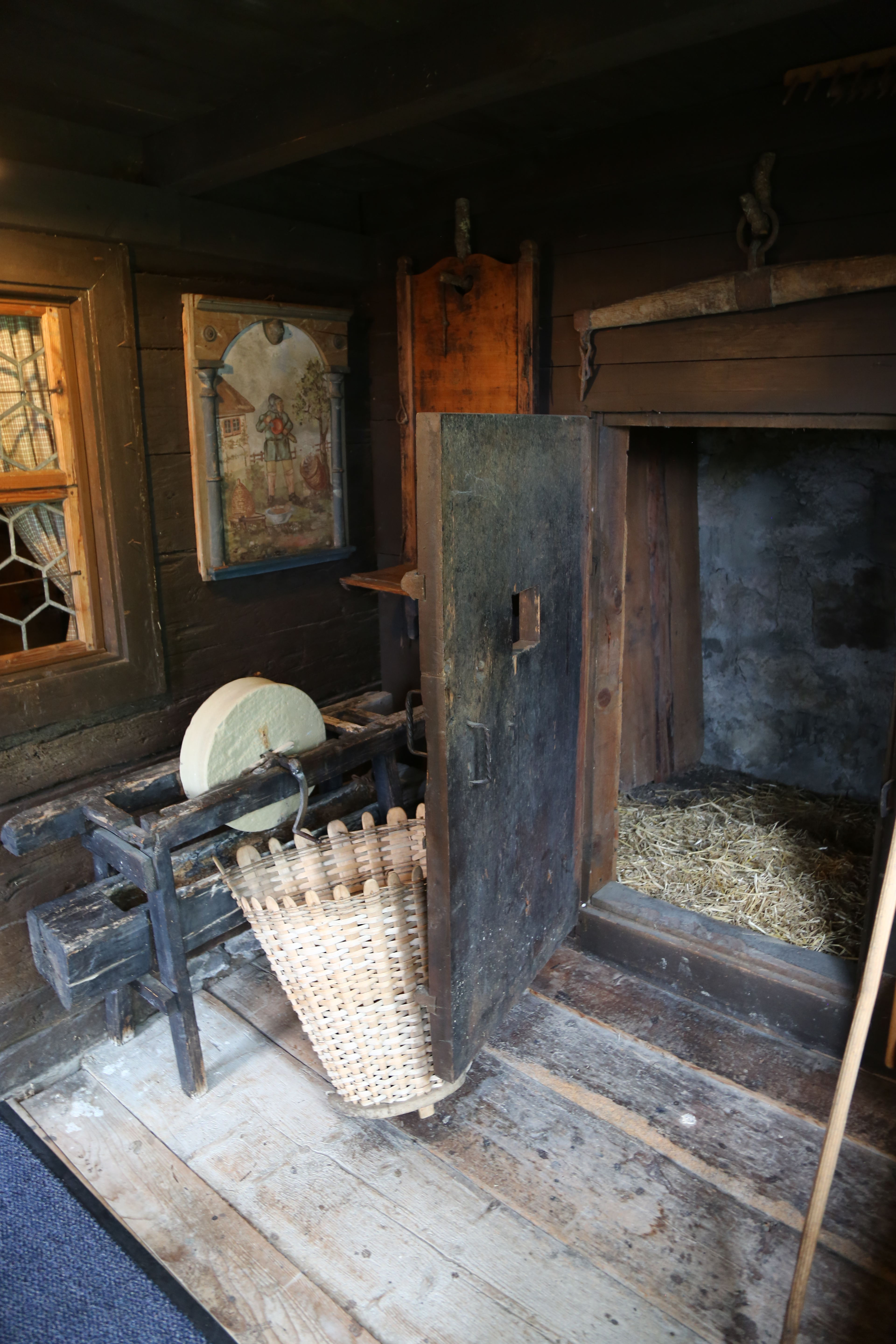 Walserhaus Triesenberg, Innenraum